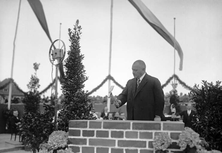 Die feierliche Grundsteinlegung des neuen Funkhauses am Reichskanzlerplatz inBerlin! Das neue Funkhaus soll das schönste und modernste der Welt werden. Reichspostminister Schätzel als Vertreter der Reichsregierung vollzieht die ersten drei Hammerschläge während der feierlichen Grundsteinlegung.